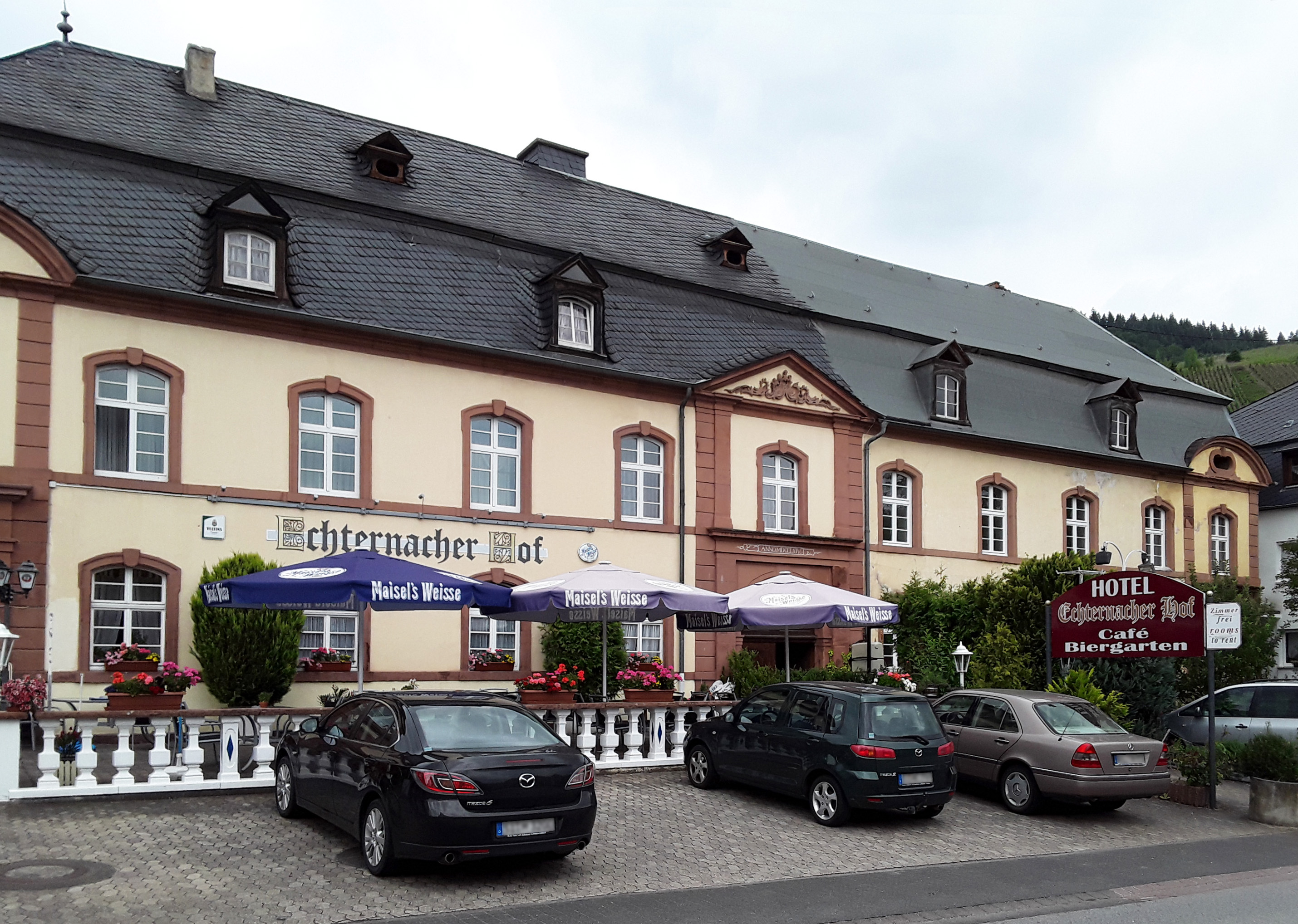 Echternachter Hof in Kröv an der Mosel